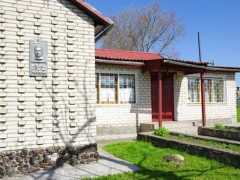 Літаратурны музей Кузьмы Чорнага ў Цімкавічах. Уваход у музей. Мемарыяльная шыльда. Фота з сайта Дзяржаўнага музея гісторыі беларускай літаратуры